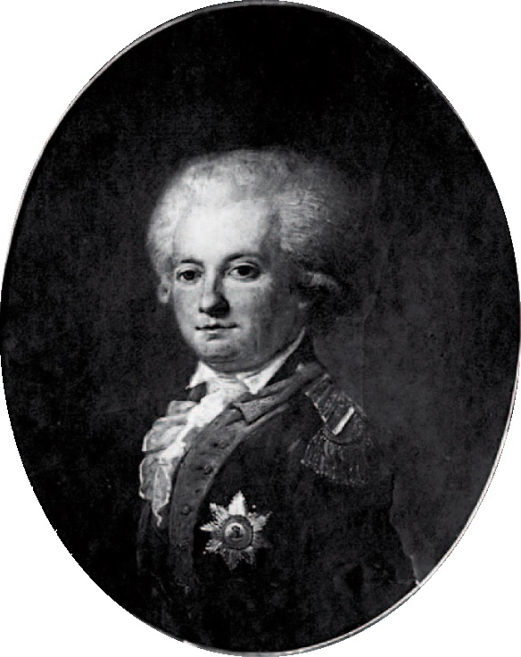 Józef Aleksander Lubomirski (1751-1817)